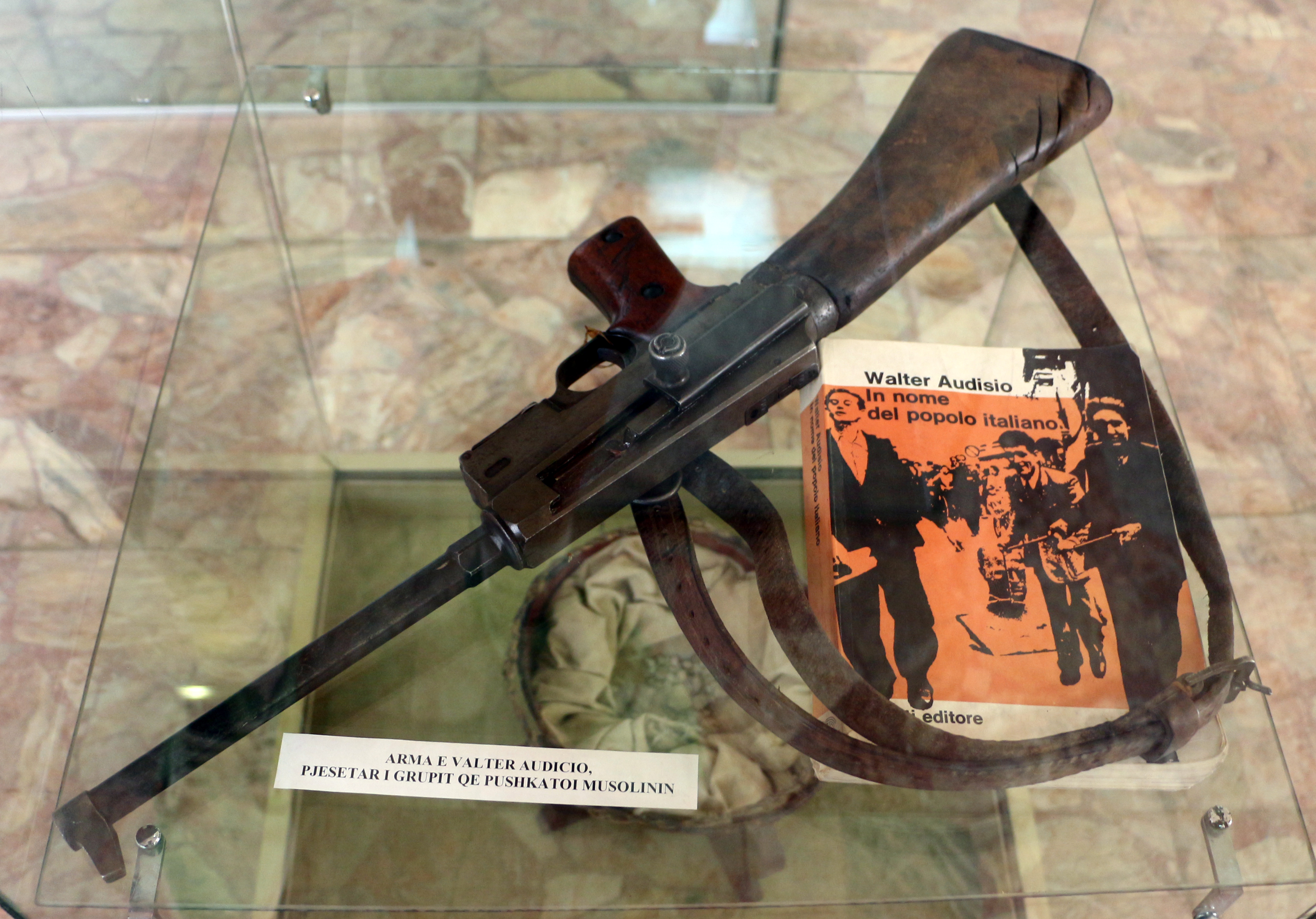 Muzeu Historik Kombëtar